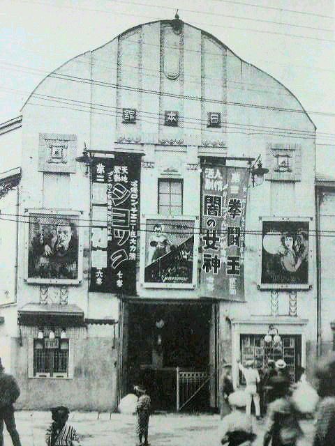 日本館、1924年の写真